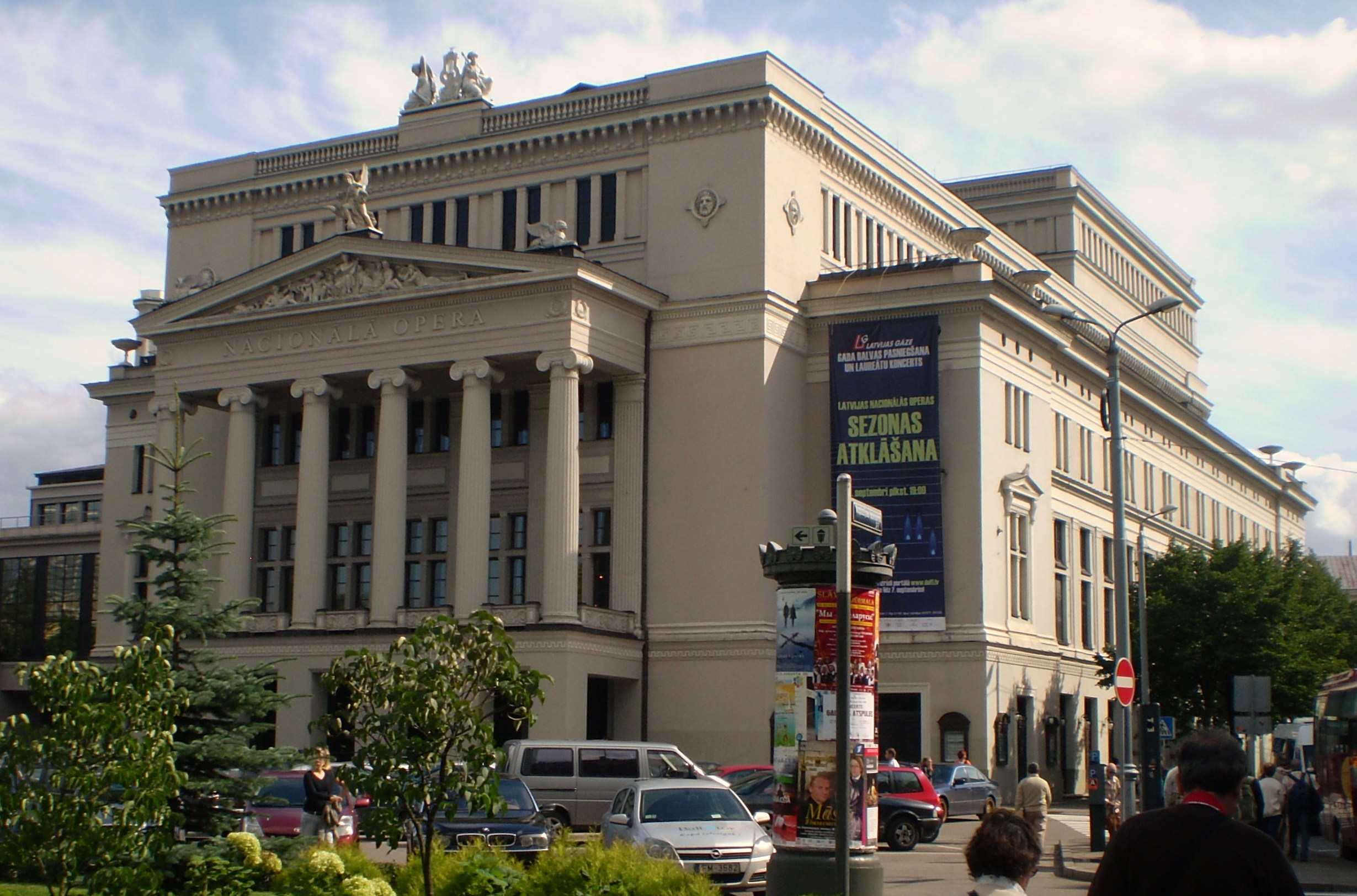 Ópera Nacional de Letonia, Riga, Letonia